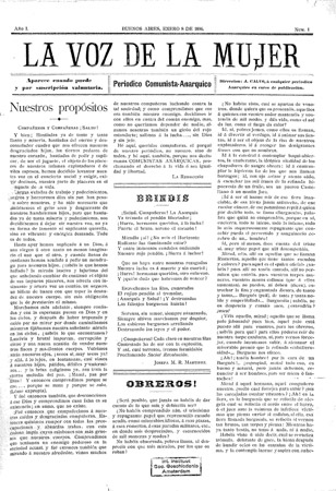 Revista La voz de La mujer, Año I, N° 1, Buenos Aires, 8 de Enero de 1896, reproducción de cubierta, original perdido, facsimil microfilmado, Archivo Cedinci.